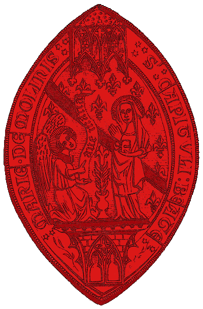 Sceau du chapitre-cathédral de Moulins (France)